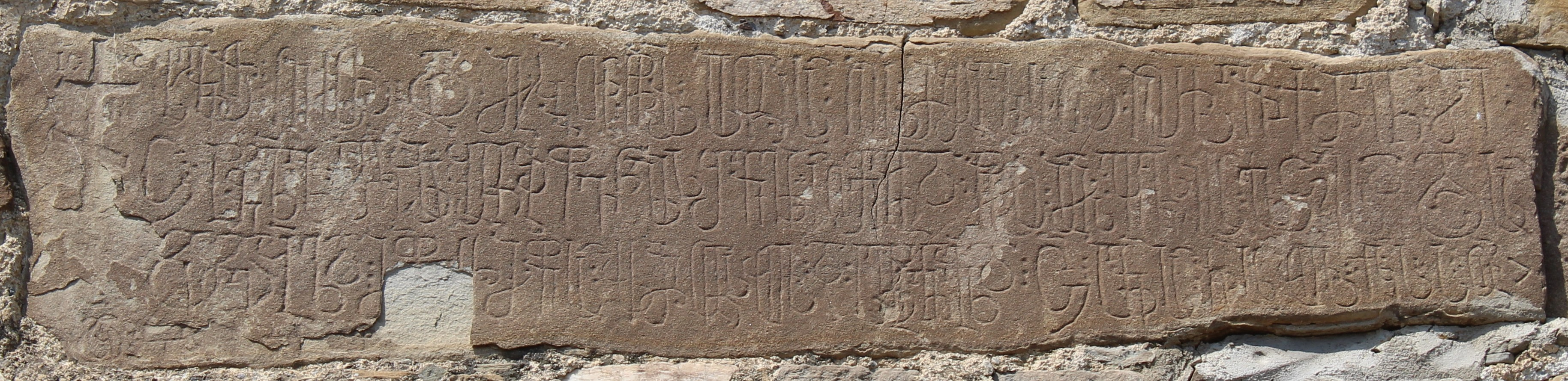 წინარეხის ღვთისმშობლის ეკლესიის წარწერა